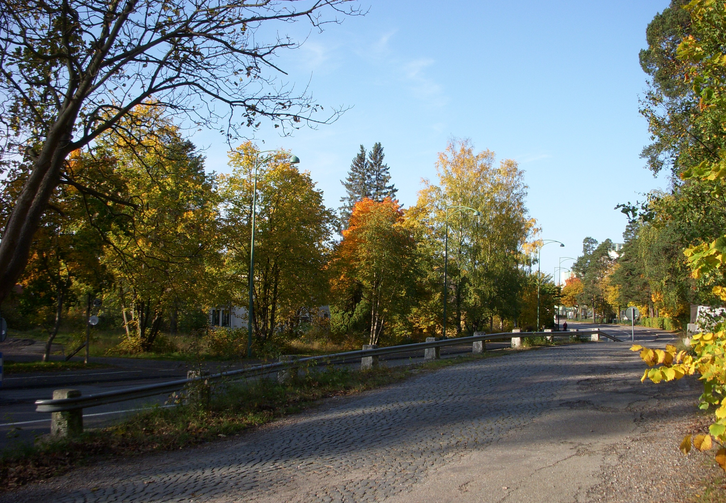 Värmdövägen i höjd med nr 209, västerut (Nacka) med en liten del av gamla Värmdövägen